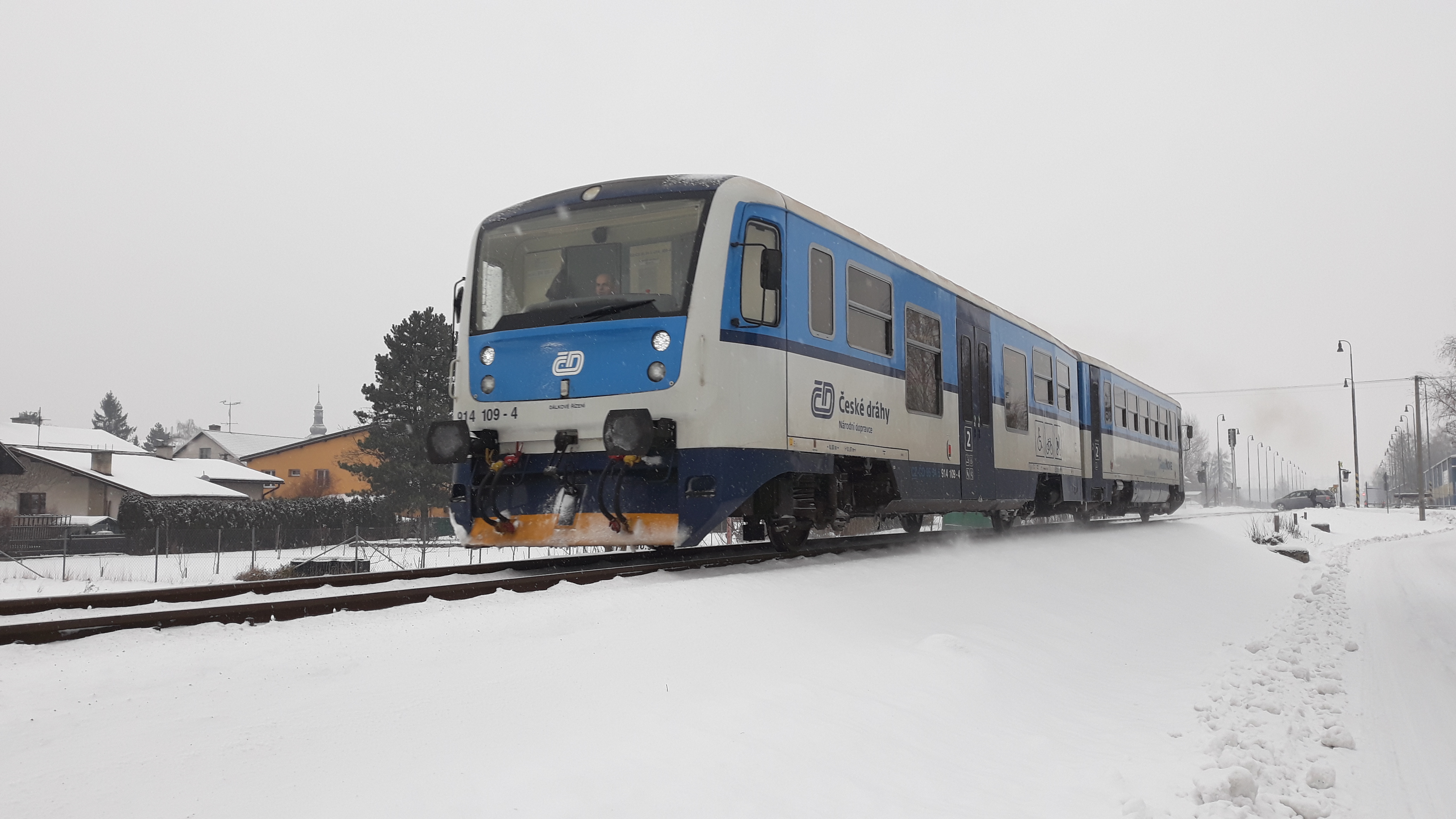 Motorová jednotka 814 v Dobré u Frýdku-Místku